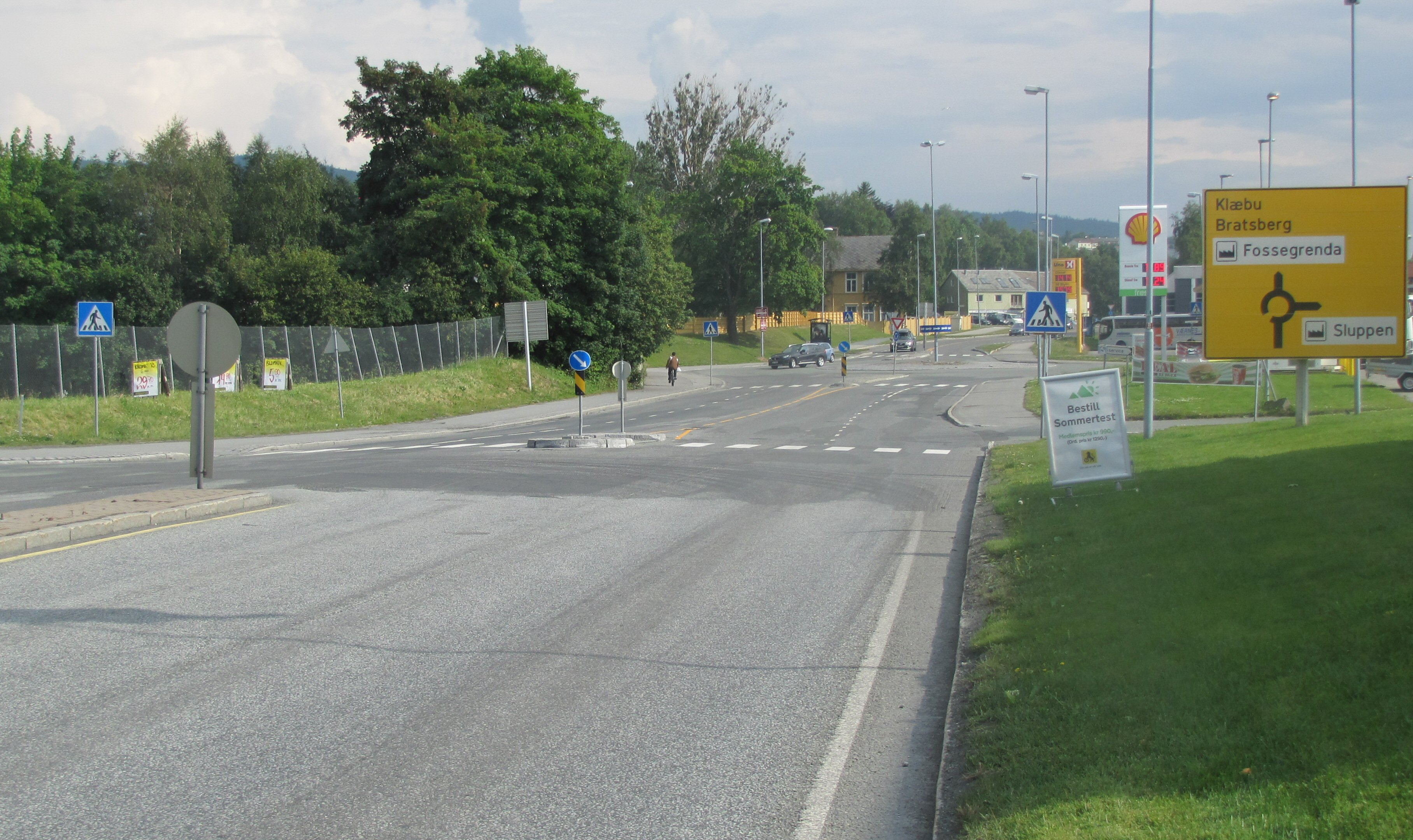 Bratsbergvegen (FV885), Trondheim